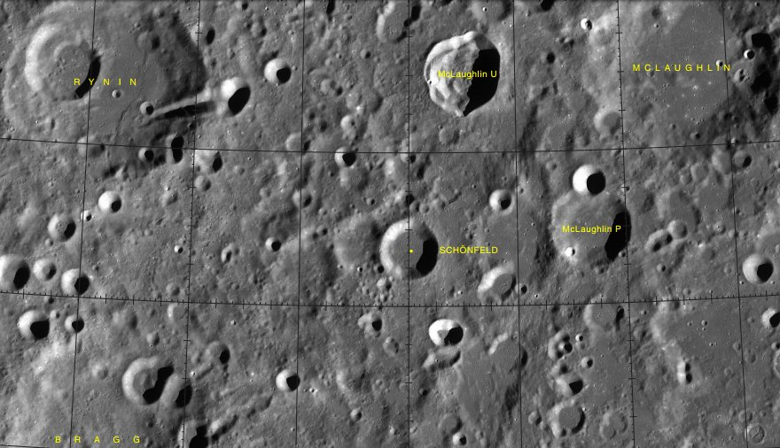 Cráter lunar Schönfeld. Localización. (Imagen LRO)